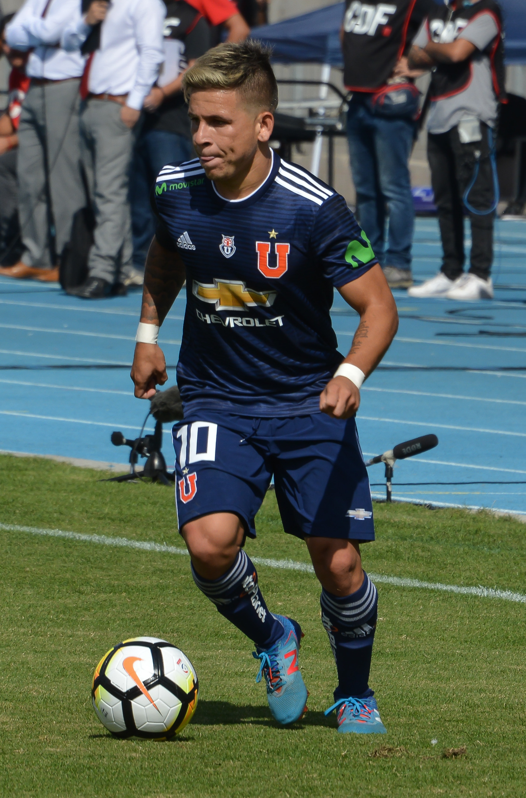 Universidad de Chile v Colo-Colo, Estadio Nacional, Santiago, Chile.